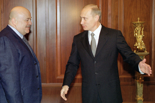 МОСКВА, КРЕМЛЬ. С председателем Союза театральных деятелей России Александром Калягиным.